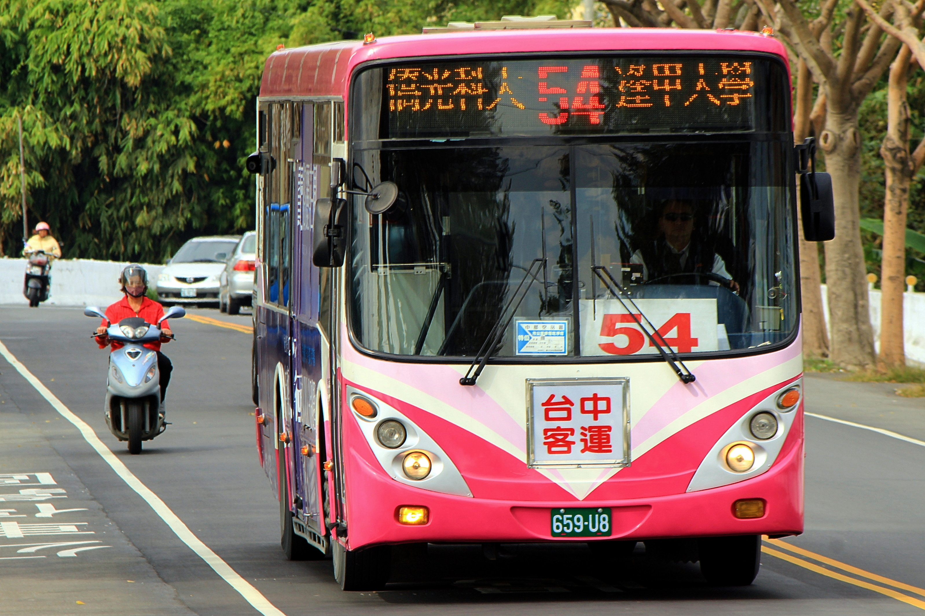 中文（台灣）: 台中客運 北客二手櫻花車659-U8